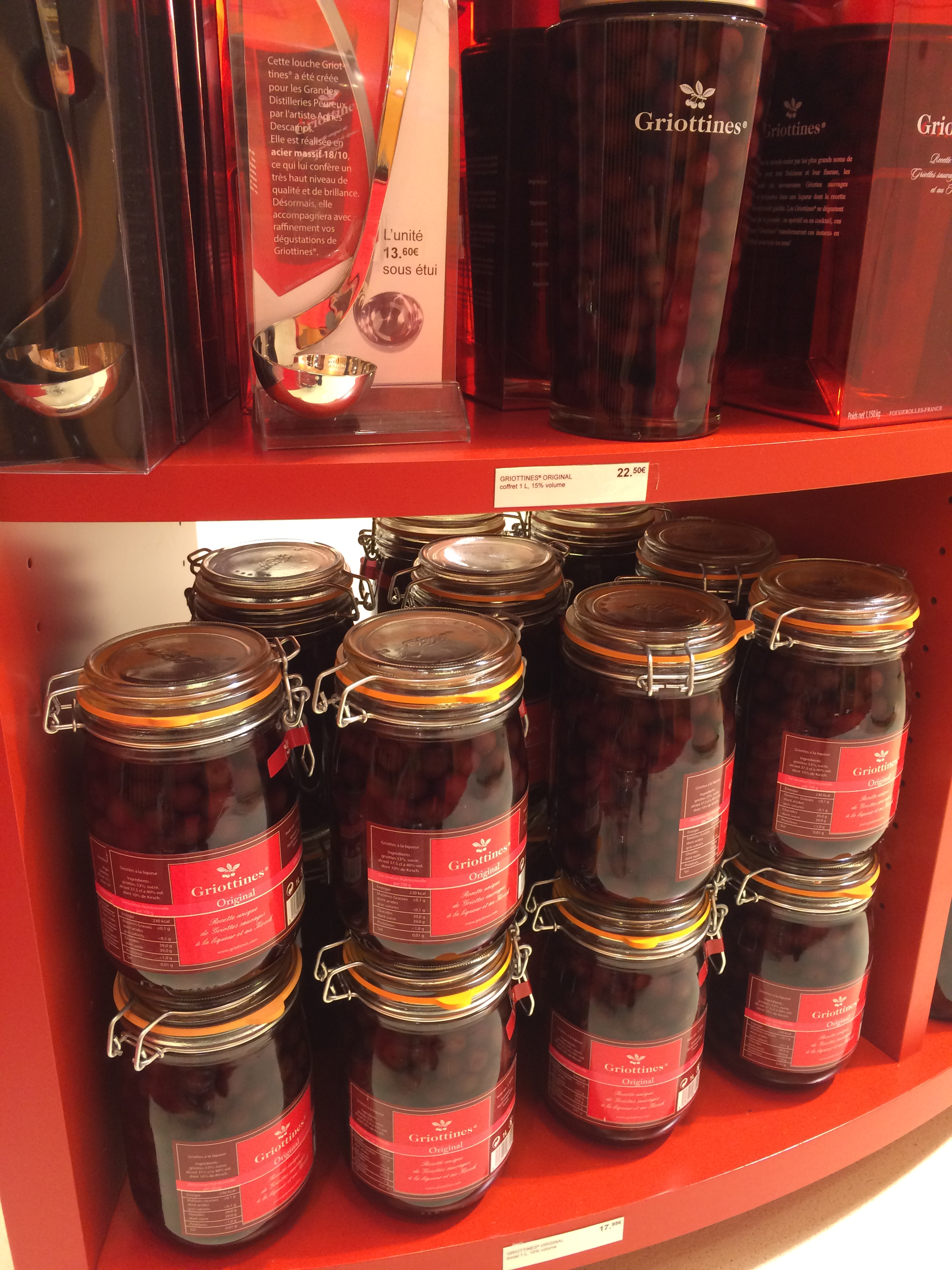 Différents bocaux de Griottines dans la boutique de la distillerie Peureux à Fougerolles (Haute-Saône). En haut à gauche, louche à Griottines.